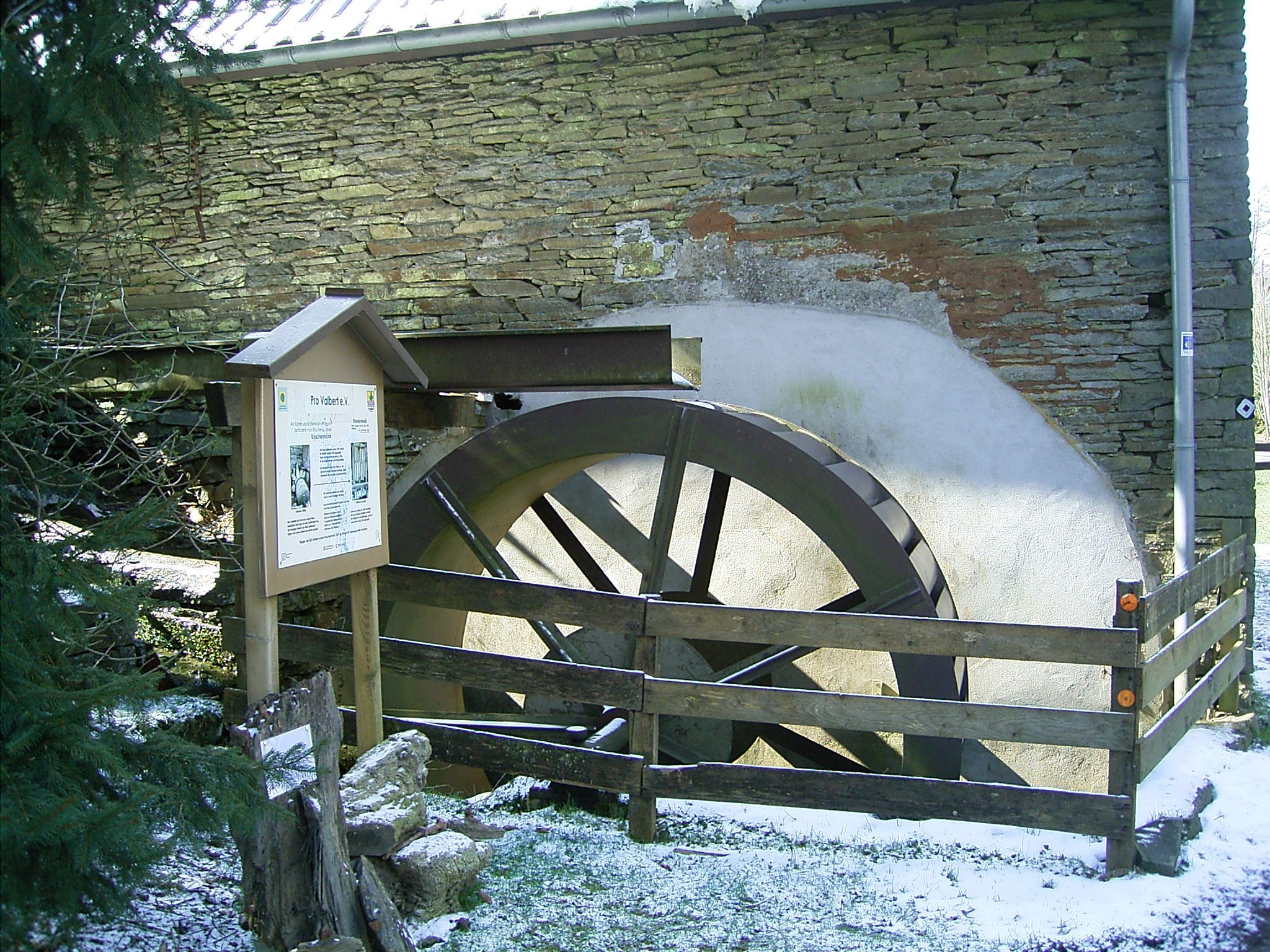 Knochenmühle in Meinerzhagen - Valbert